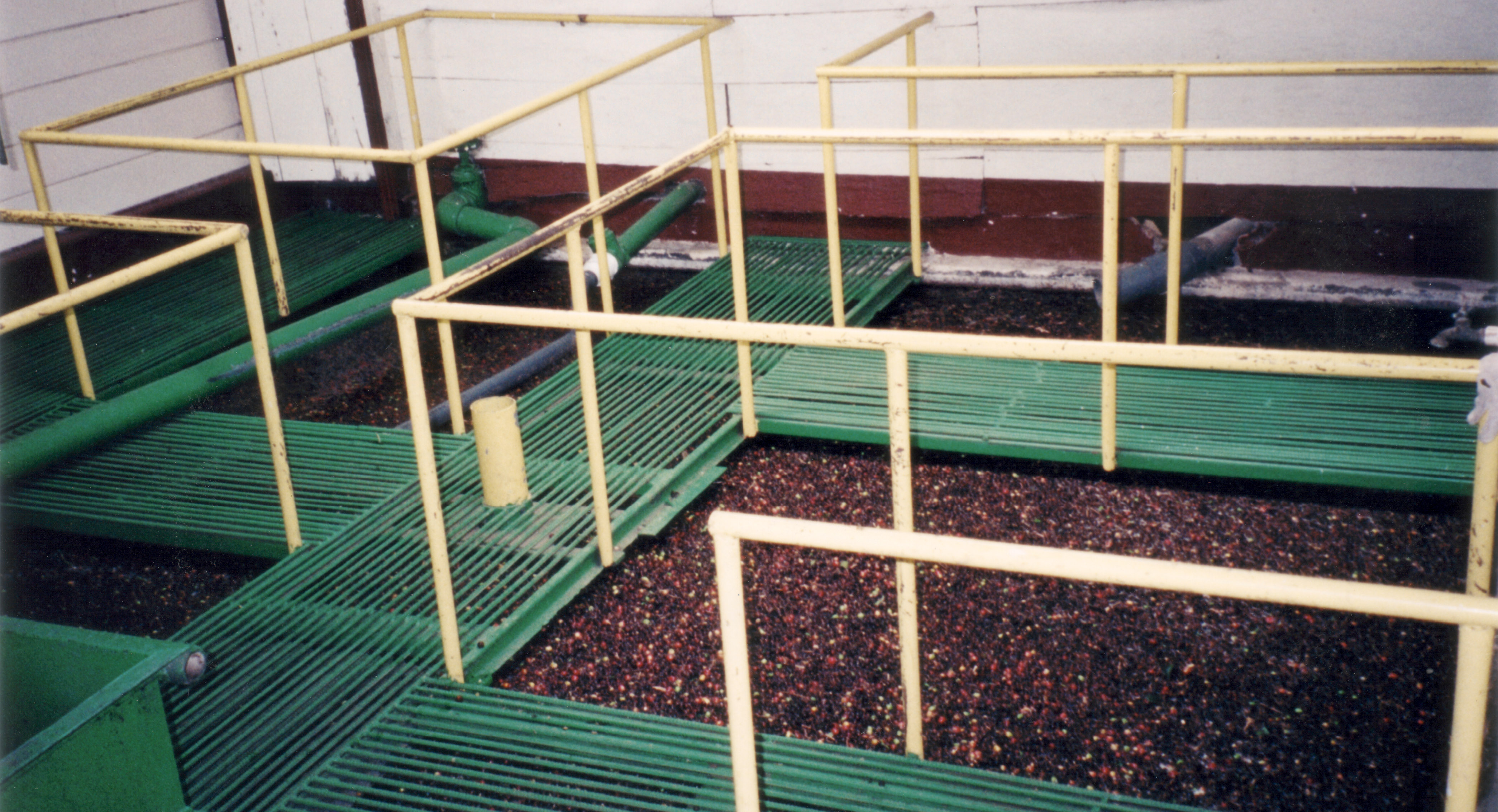 Clasificación de los granos por separación en cubas de agua Coffee sorting in water